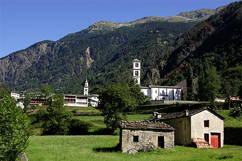 Brusio